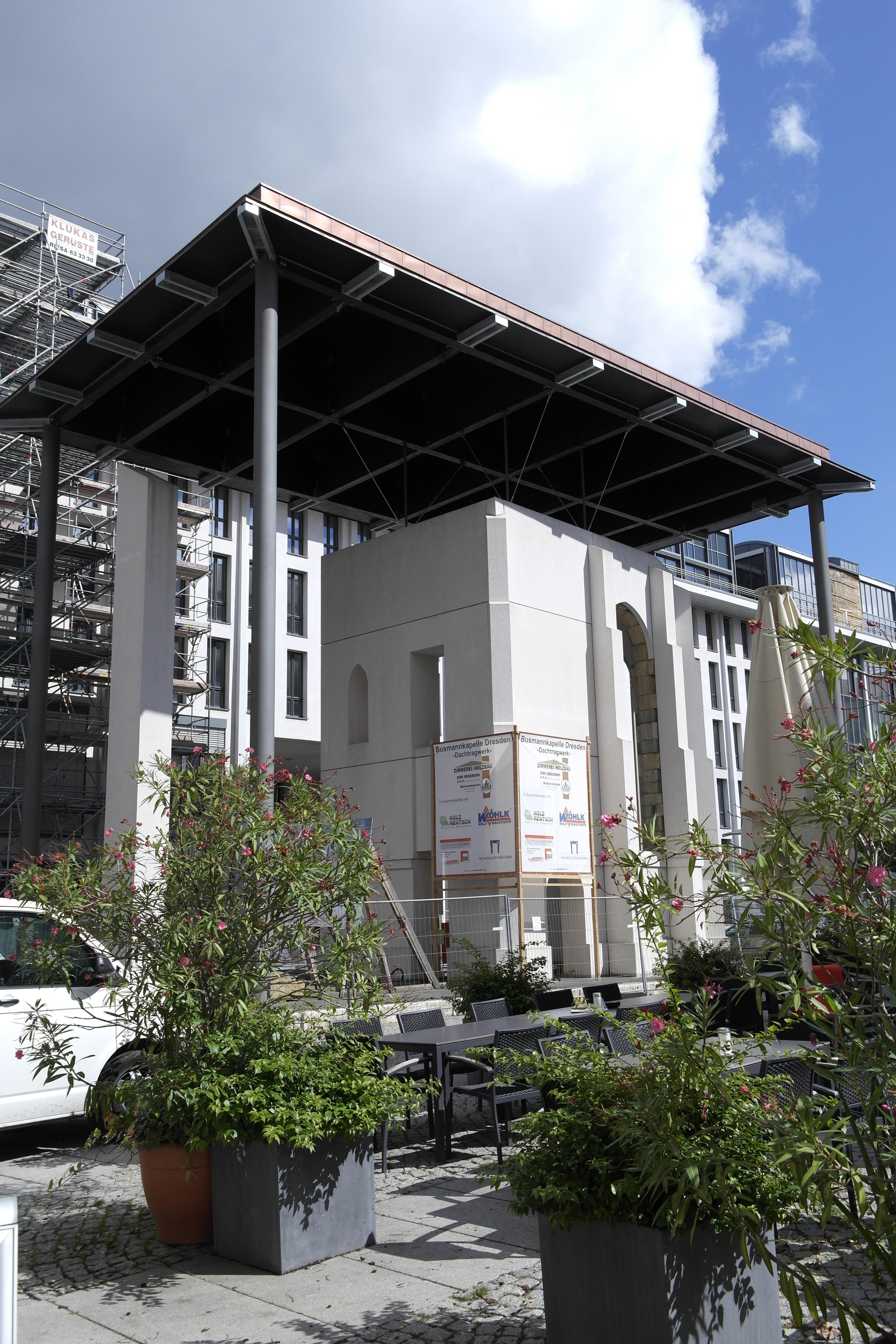 Dresden, Busmannkapelle